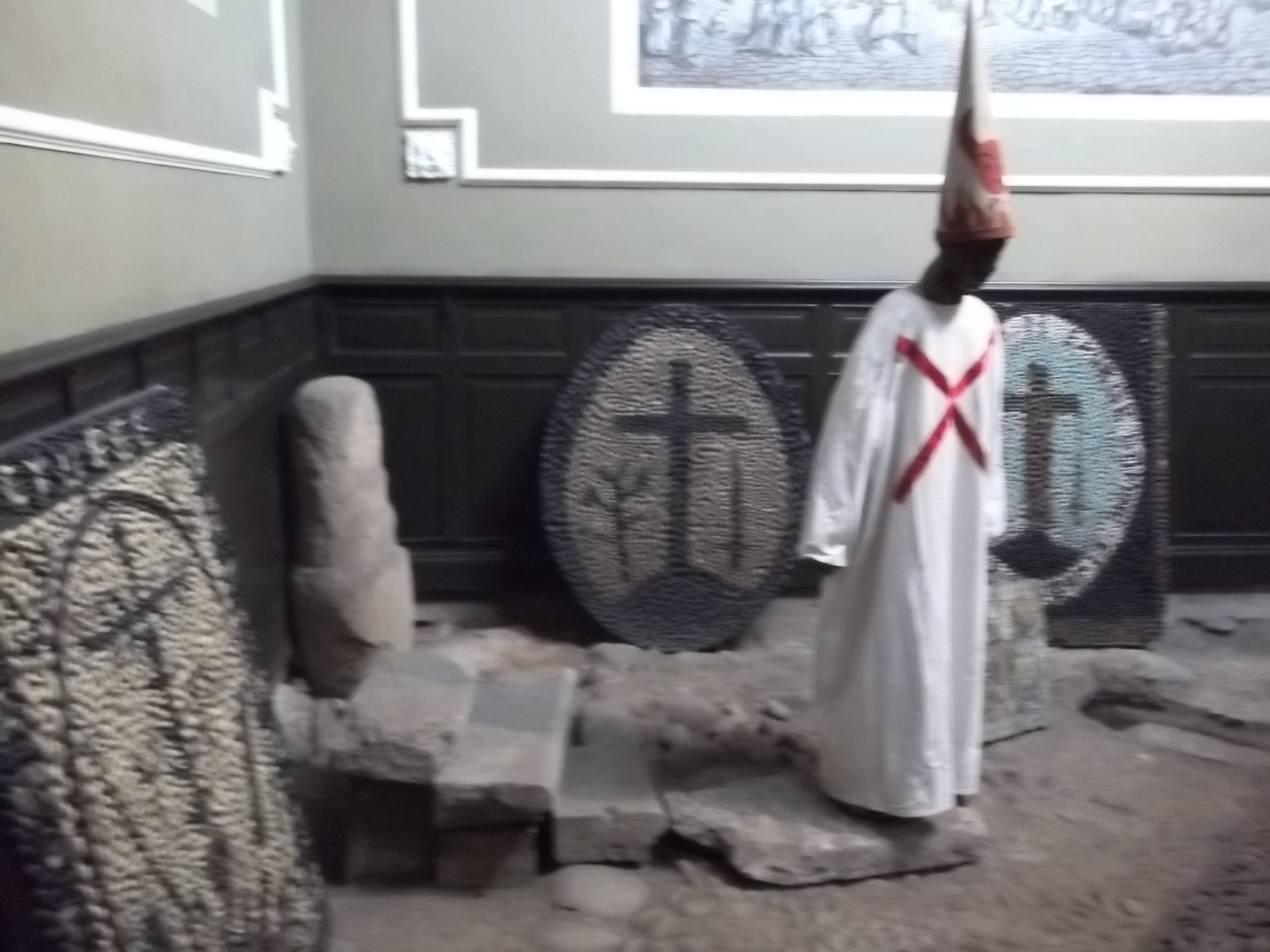 Sala donde se muestran distintos símbolos usados por la Inquisición de Lima, Perú, y un atuendo denominado Sanbenito que portaban los declarados reos de herejía.